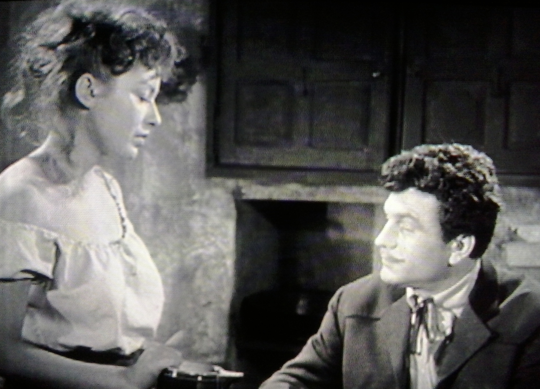 Henri Vidal (Antonio) e Claudine Dupuis. Una scena dell'episodio "La gola" I sette peccati capitali (1952)